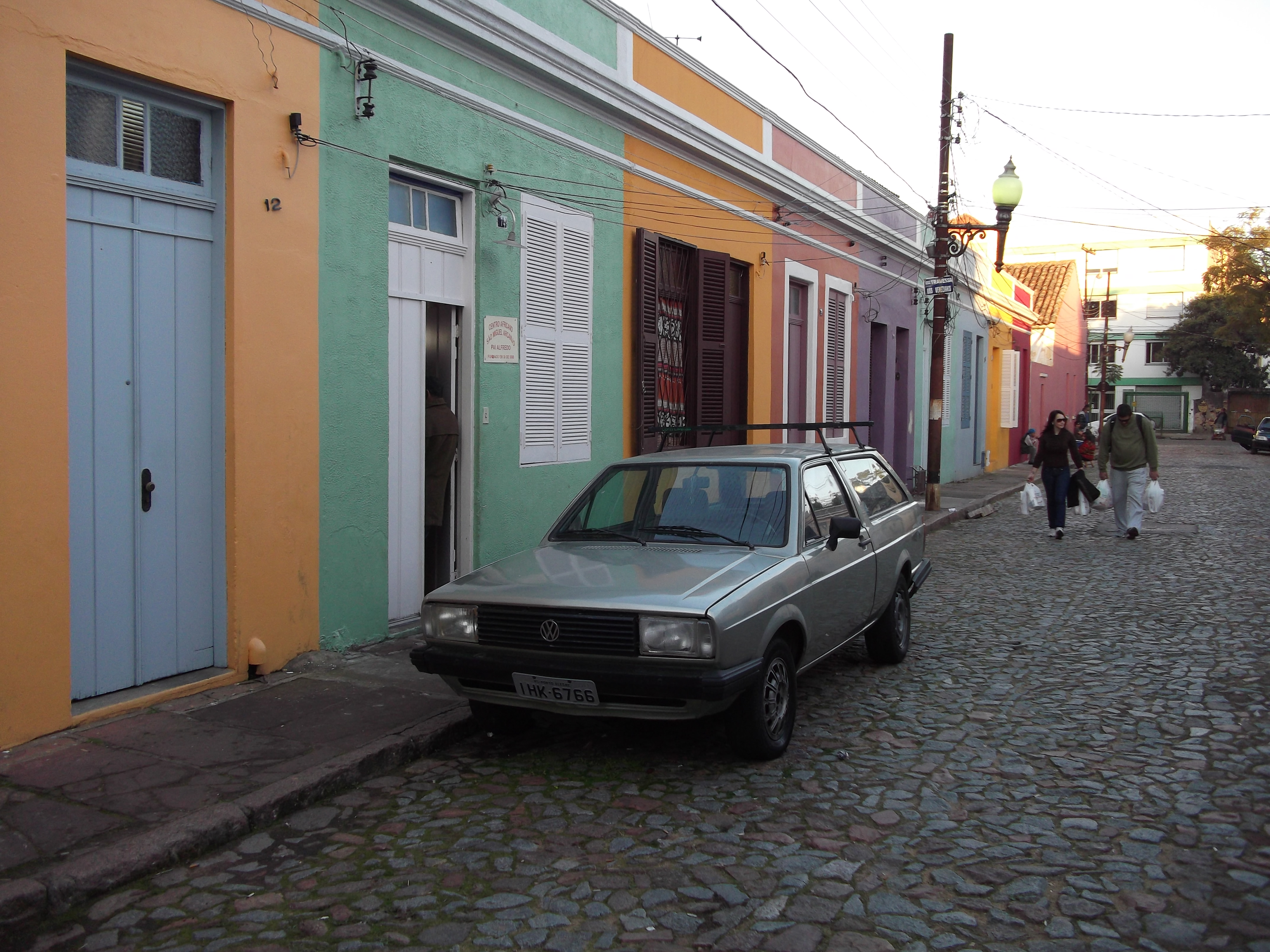 Travessa dos Venezianos, Bairro Cidade Baixa, Porto Alegre, Brasil